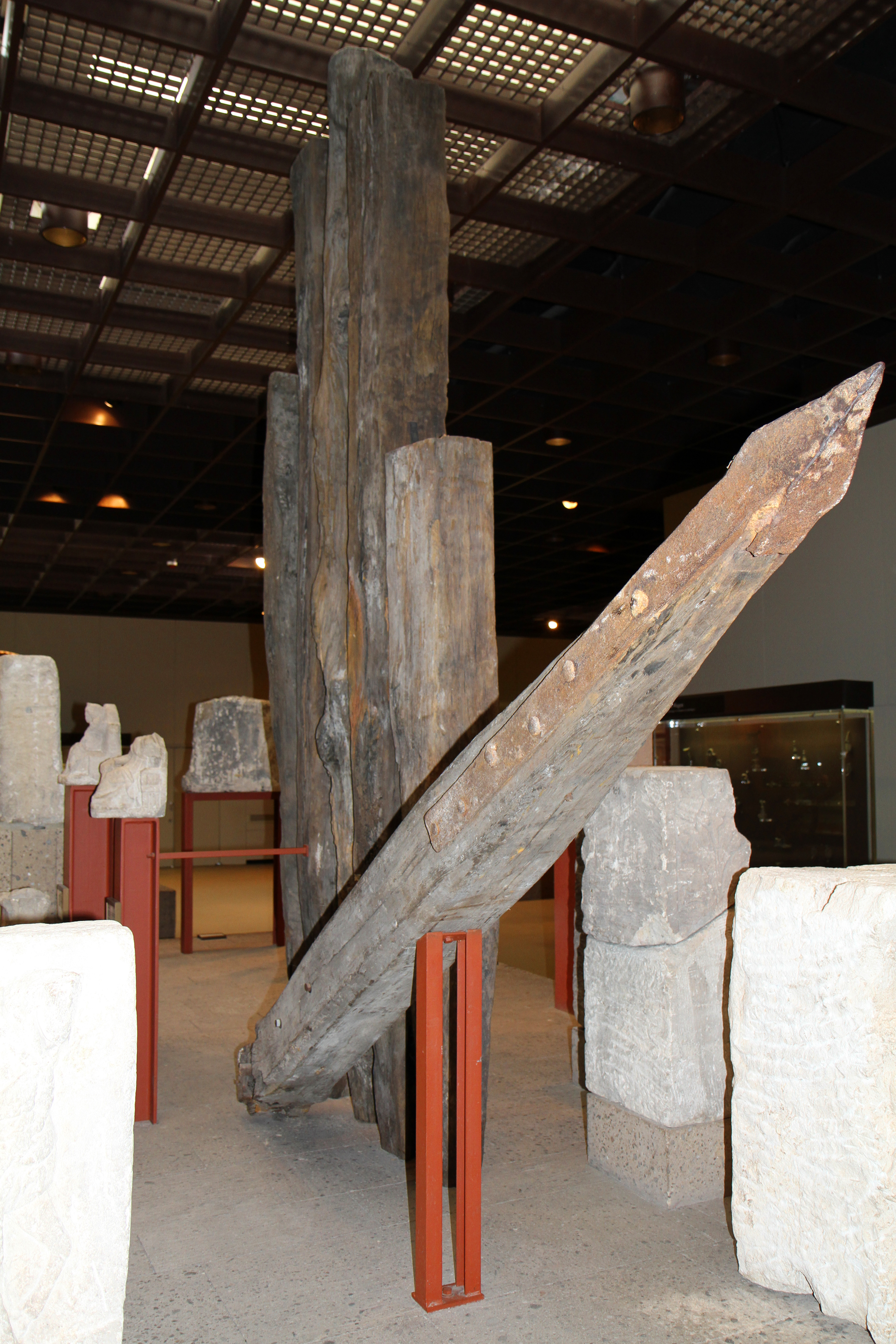 Aus dem Rhein geborgene Eichenholzbohlen der 310 n. Chr. erbauten römischen Konstantinbrücke in Köln. Die in das Flussbett gerammten Pfähle sicherten das Fundament der ehemaligen Brückenpfeiler. FO:Flussbett Kölner Rheinabschnitt. RGM Köln, Inventar Nr. 0,139; 0,140; 0.141; 0,142; 0,143